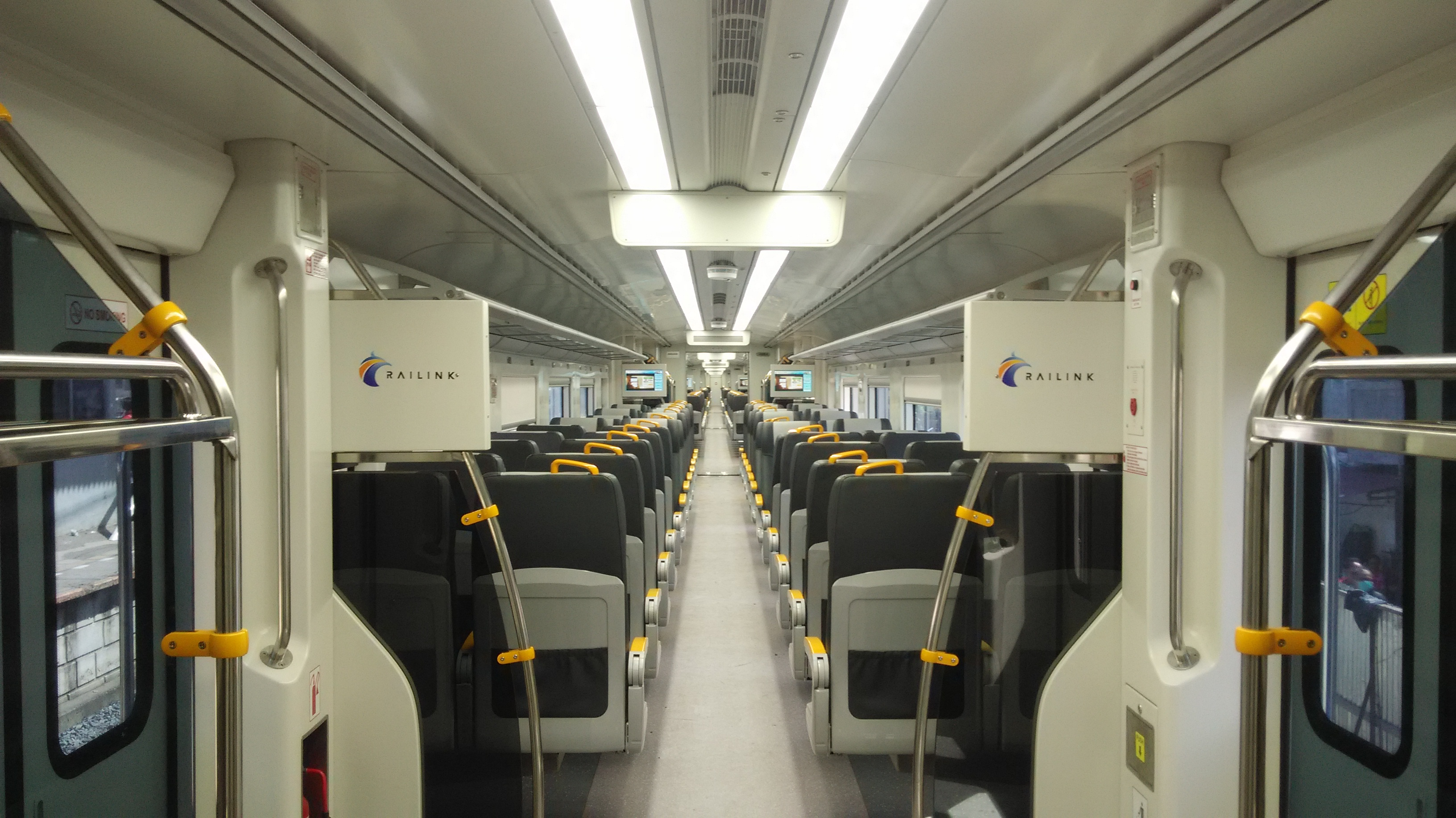 Interior KRL bandara Soekarno-Hatta seri EA203